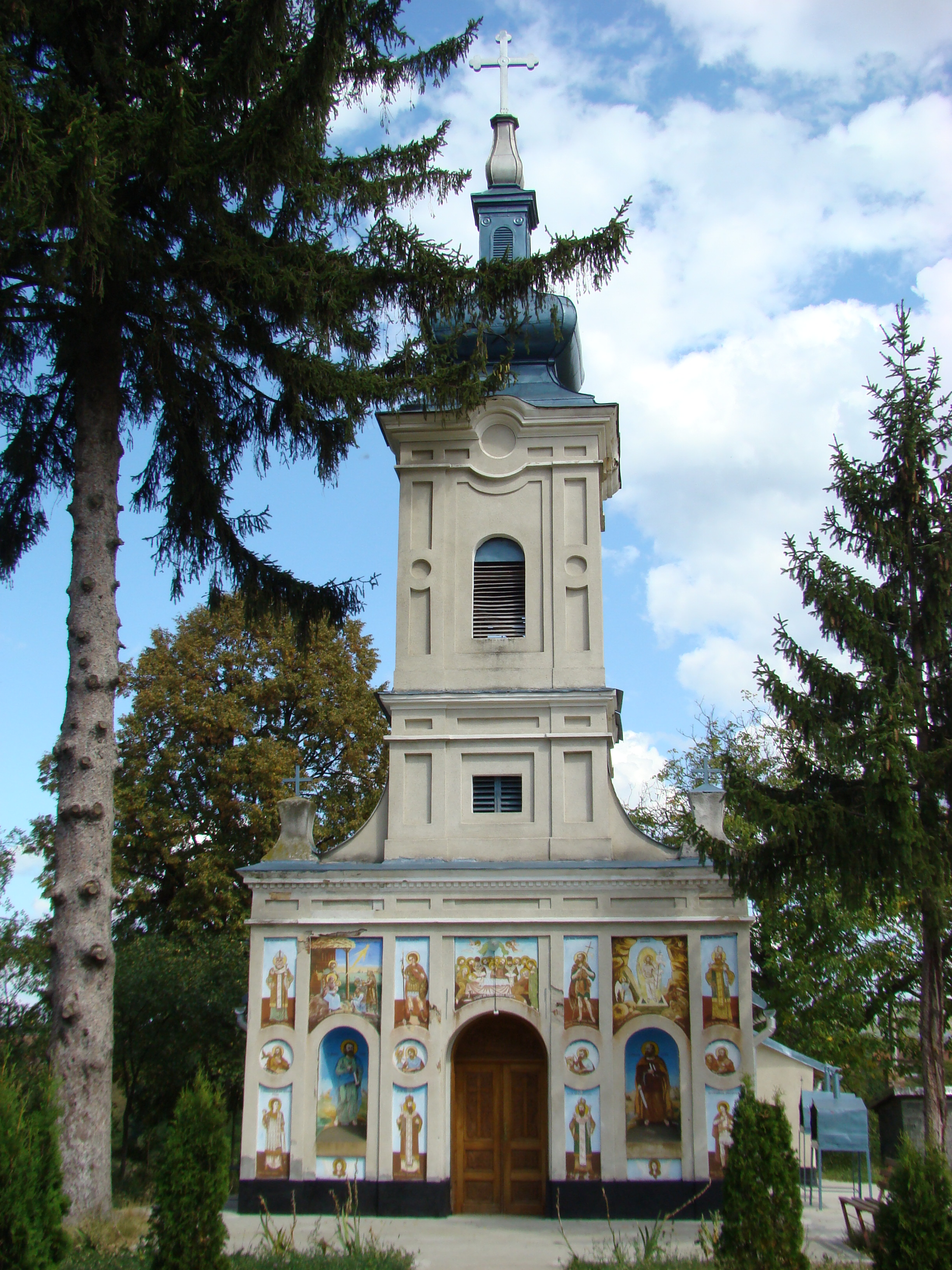 Biserica ortodoxă din Oloșag, Timiș